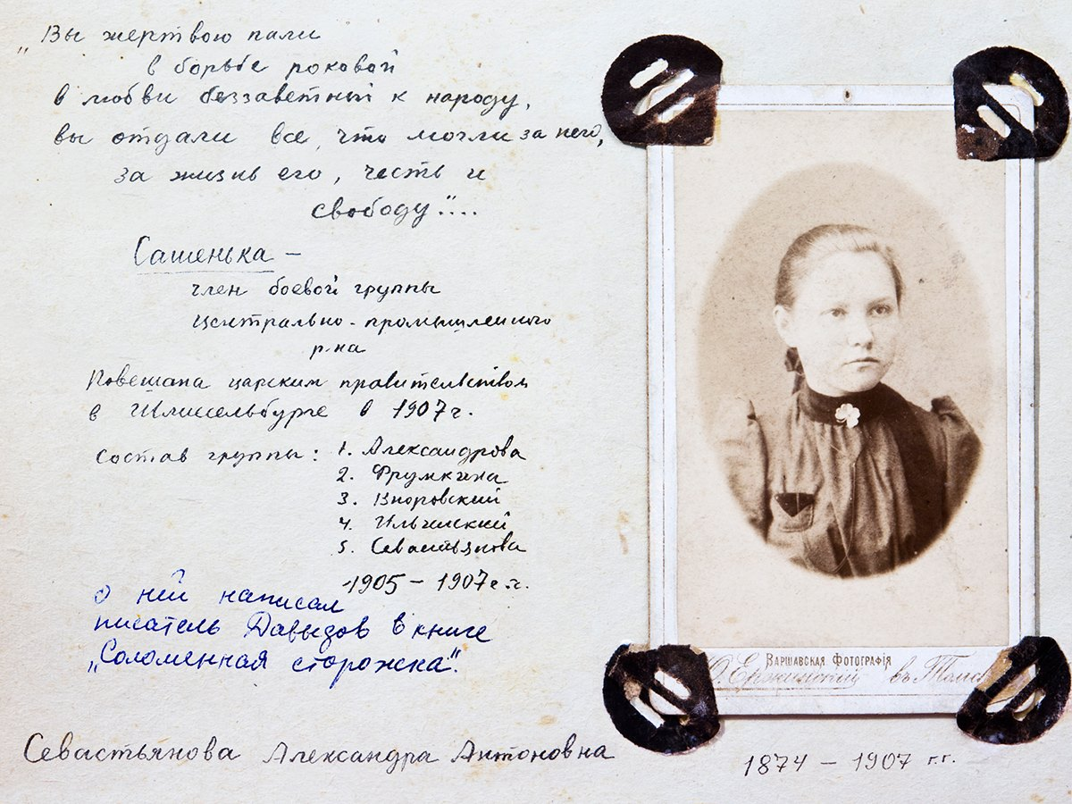 Скан страницы из семейного фотоальбома